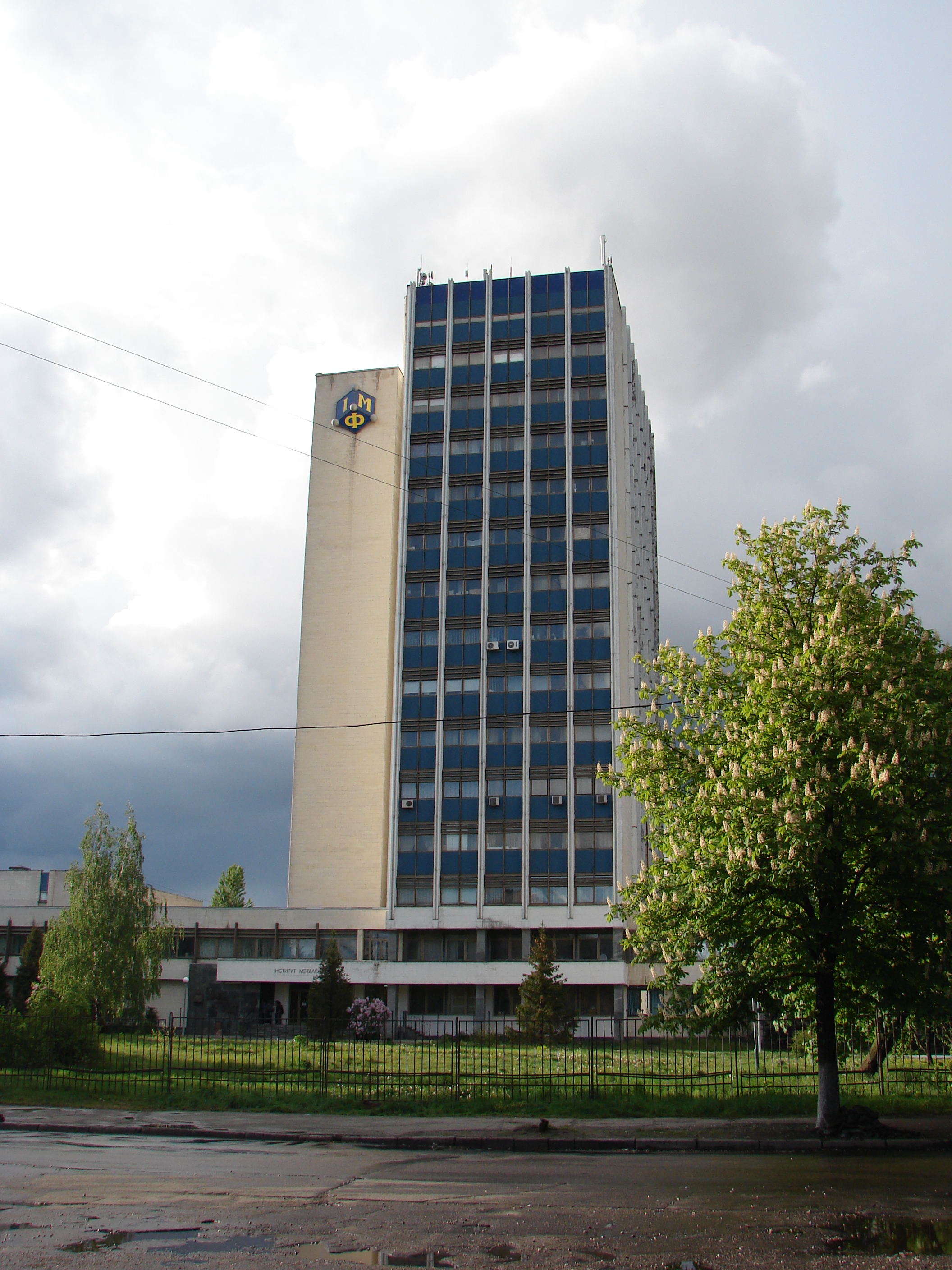 Інститут металофізики імені Г.В. Курдюмова НАН України